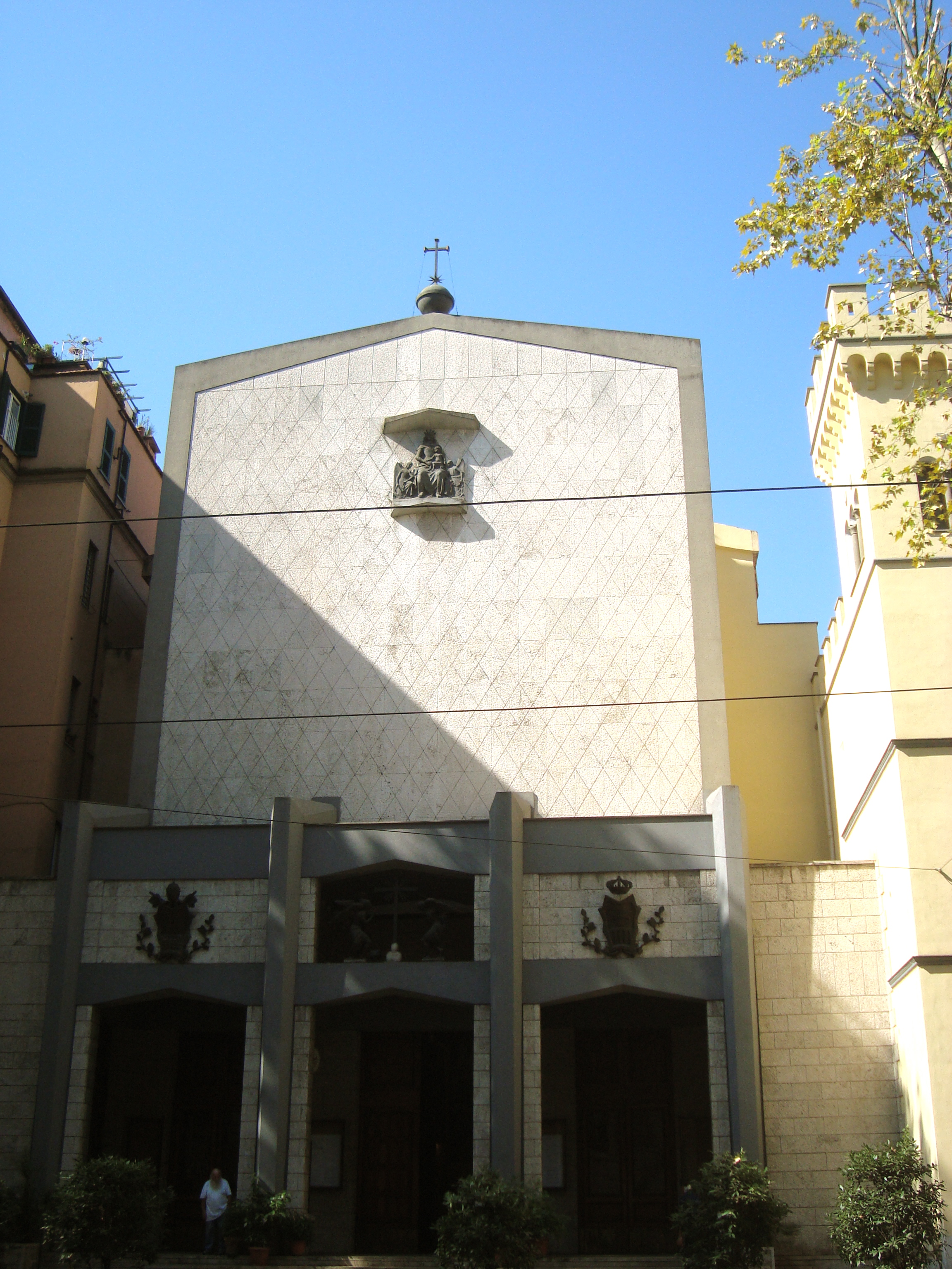 Vue de l'église Santa Maria della Mercede e Sant'Adriano dans le quartier de Salario à Rome sur la viale Regina Margherita.